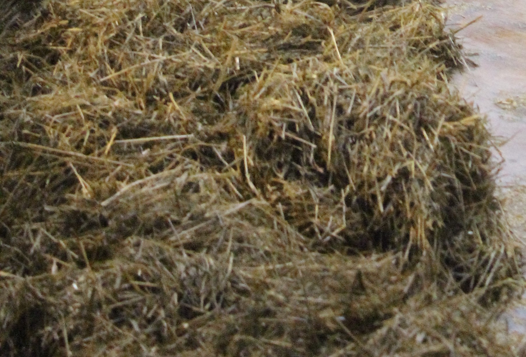 seosrehua ruokitapöydällä